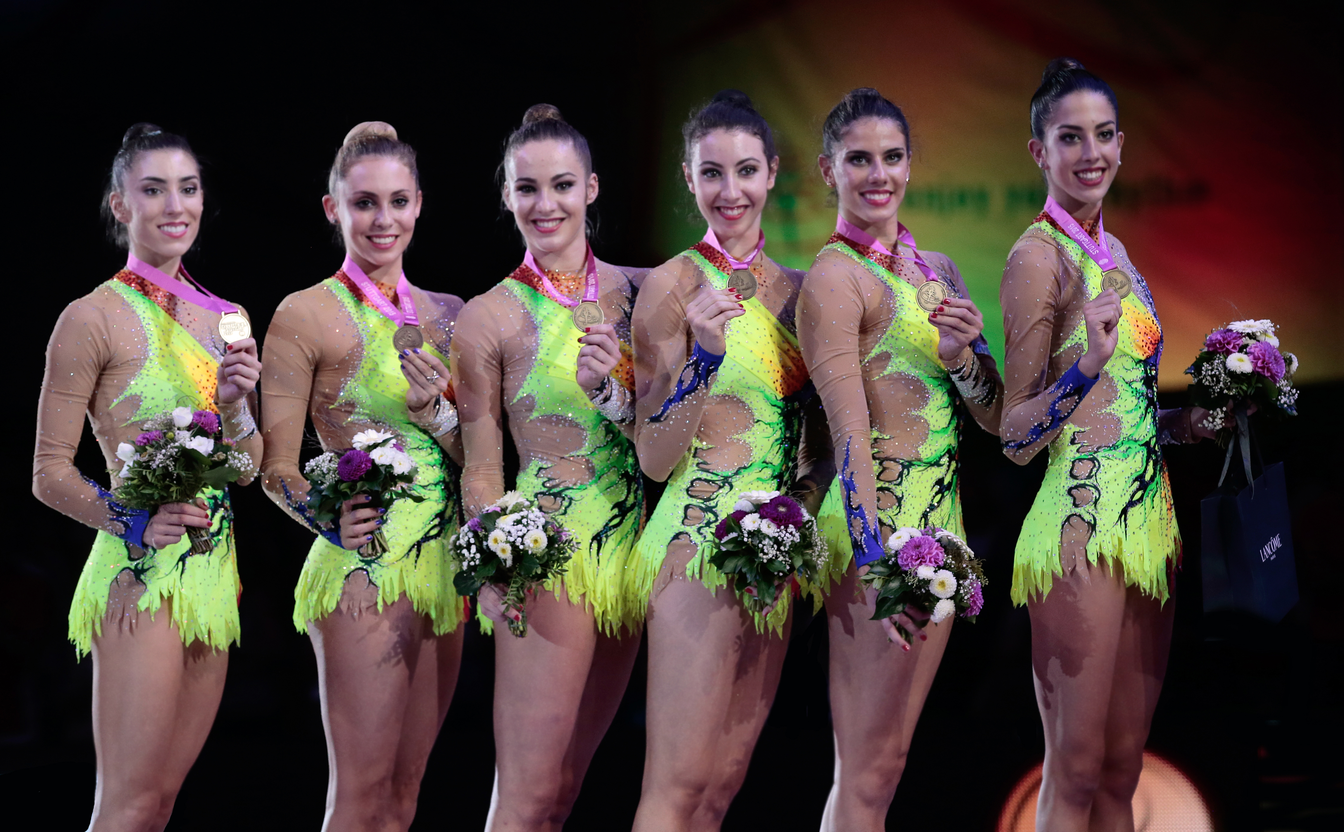 El conjunto español de gimnasia rítmica con la medalla de bronce en el podio de la general en el Campeonato Mundial de Stuttgart en 2015.